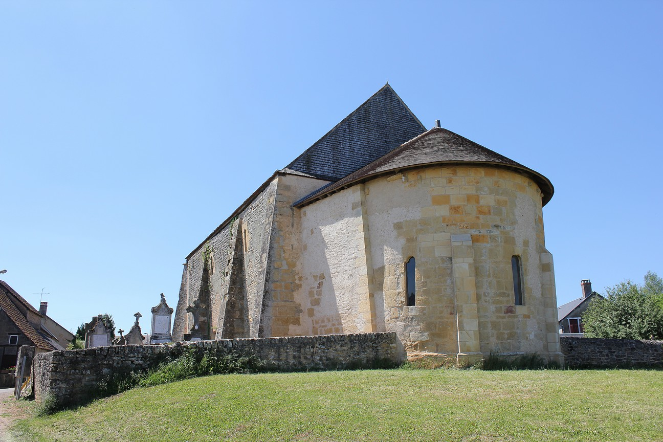 Église Saint-Antoine de Billy-Chevannes